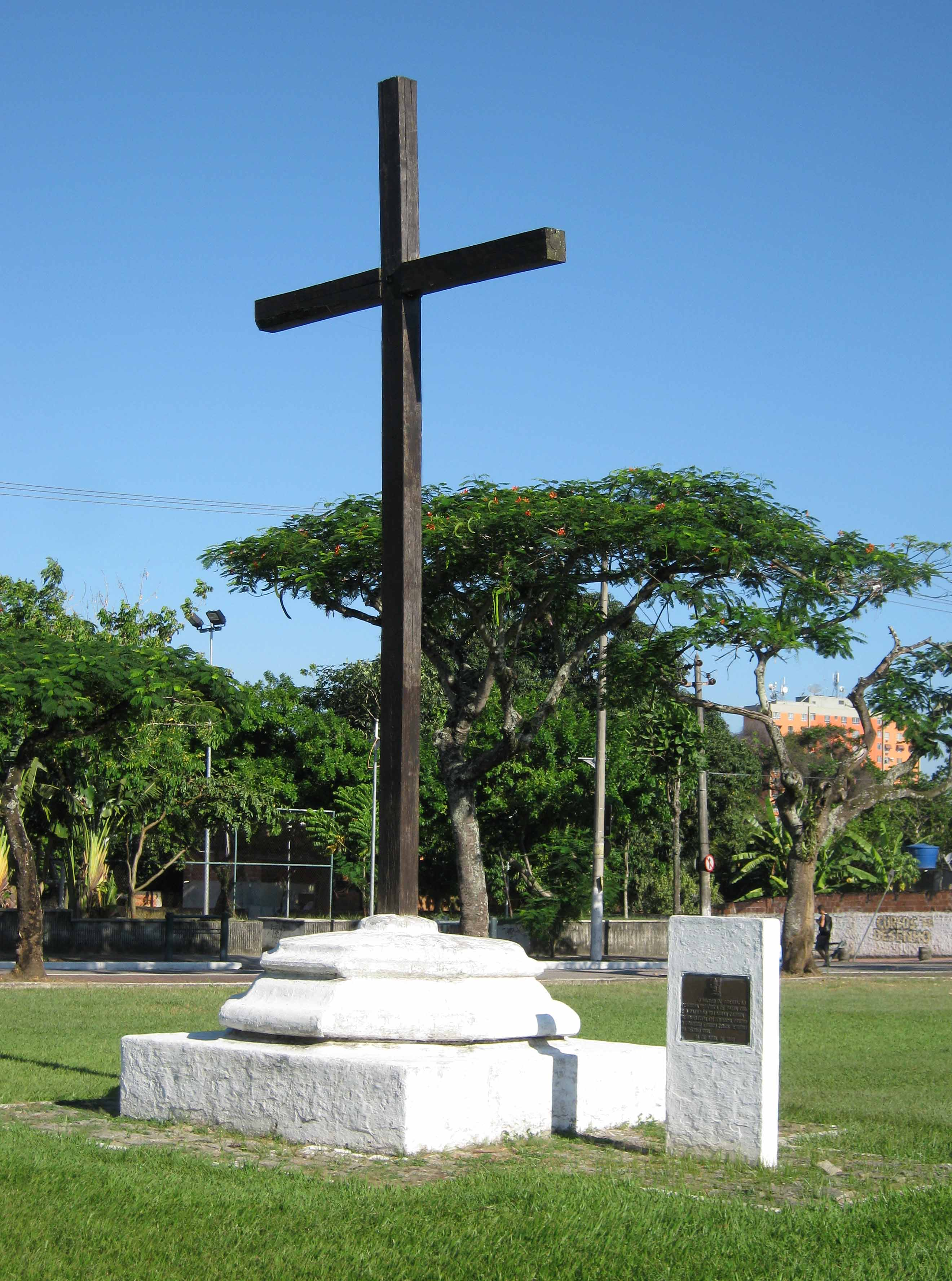 O castelo de Santa Cruz, residência de recreio da Corte, situado a onze léguas da capital, é uma antiga fazenda dos jesuítas, contendo uma igreja e um convento construídos em cima de uma colina que domina imensas planícies entrecortadas de florestas, através das quais passa o caminho para Minas Gerais. (Jean-Baptiste Debret)